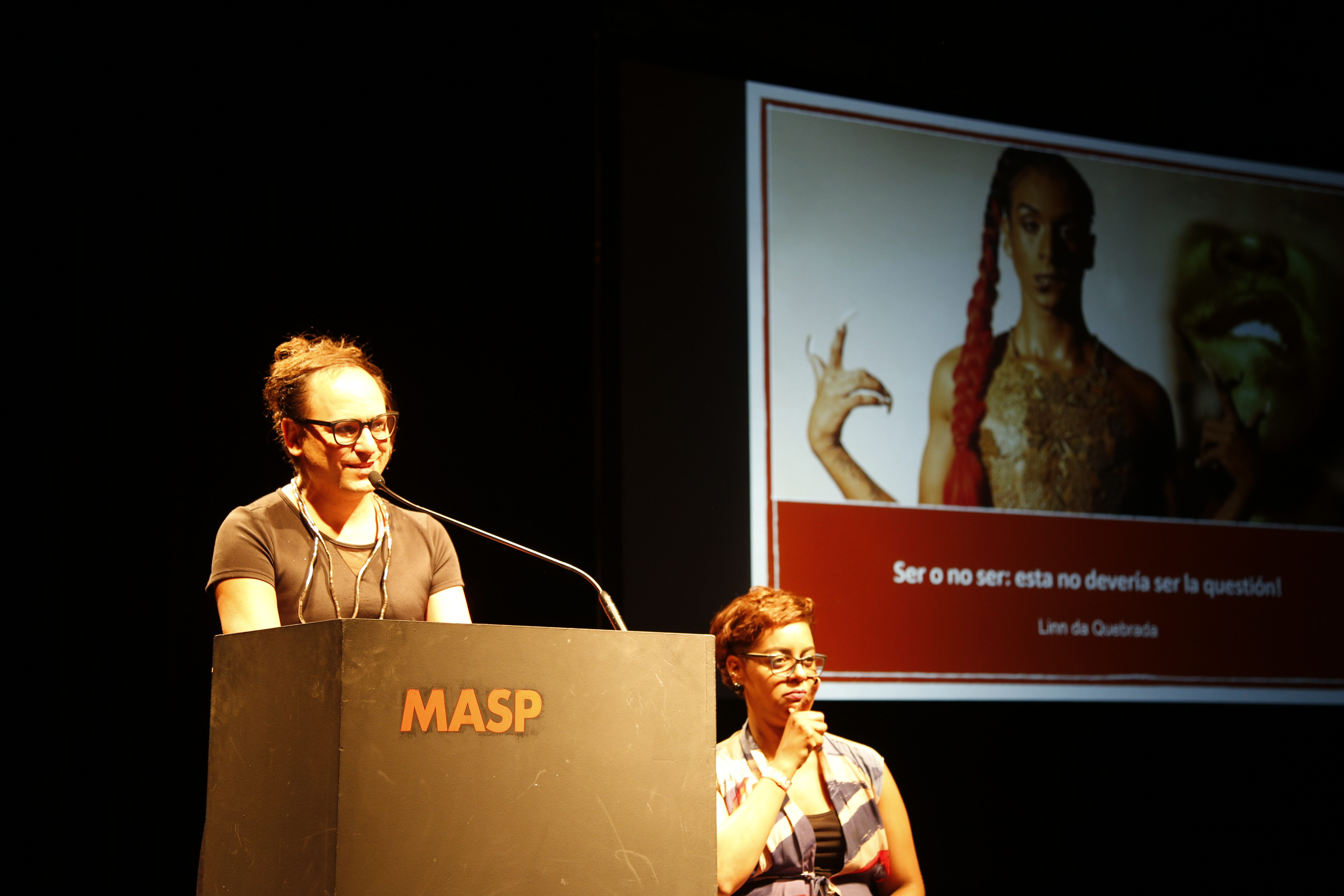 Profa. Dodi Leal dando palestra no MASP - Museu de Arte de São Paulo, em 2019